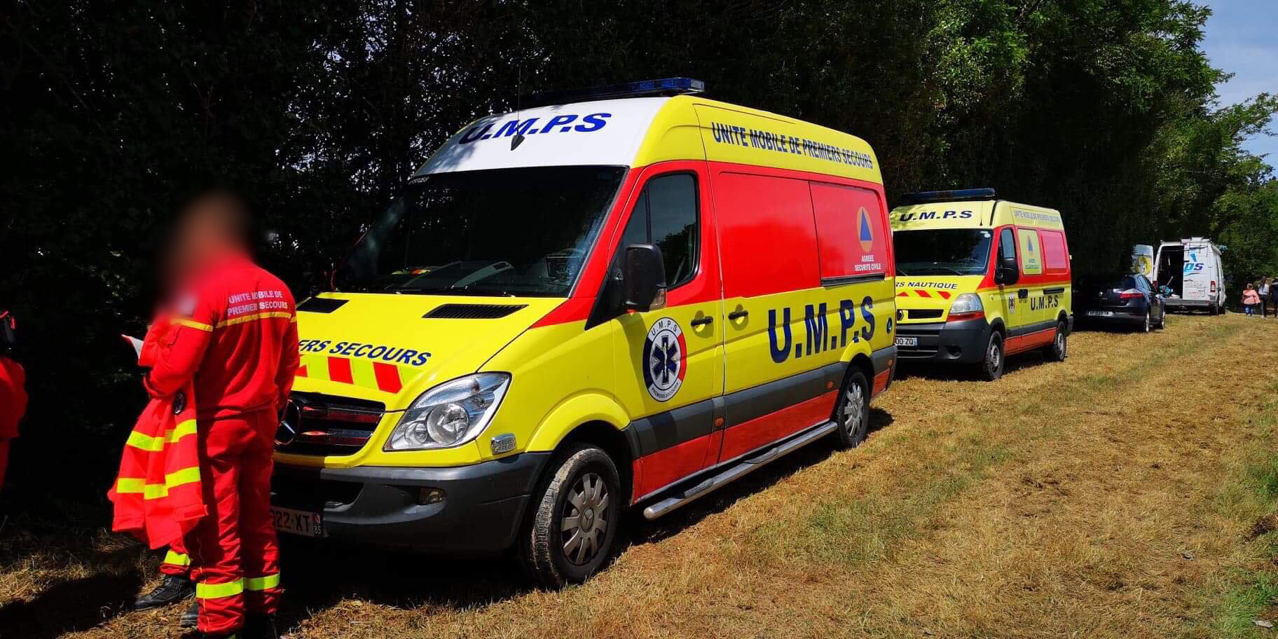 Un VPS de l'UMPS 85.